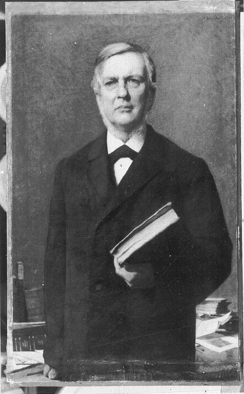 Ernst Wilhelm Förstemann (1822—1906), German librarian